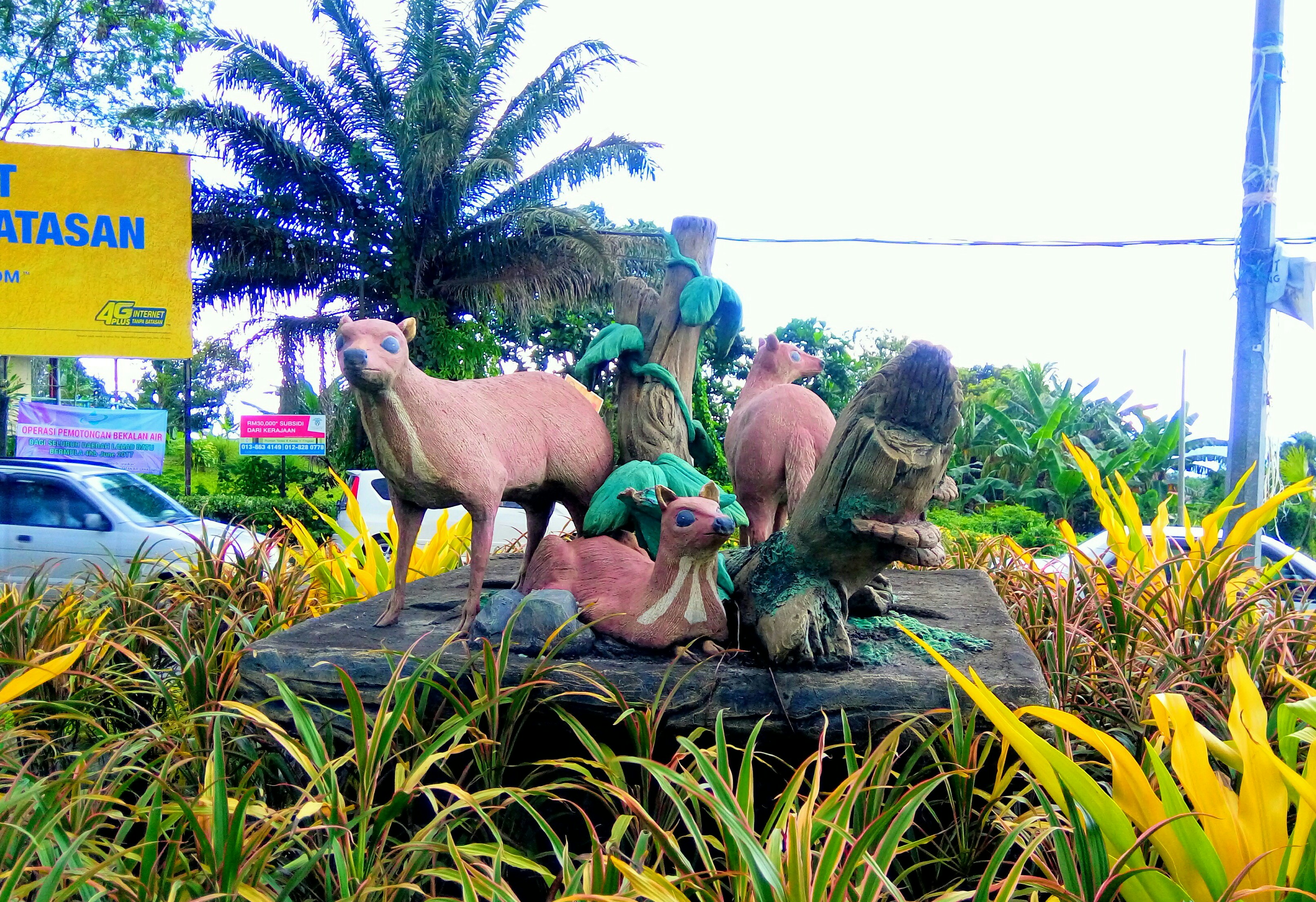 Replika Kancil di Roundabout Dam, Lahad Datu